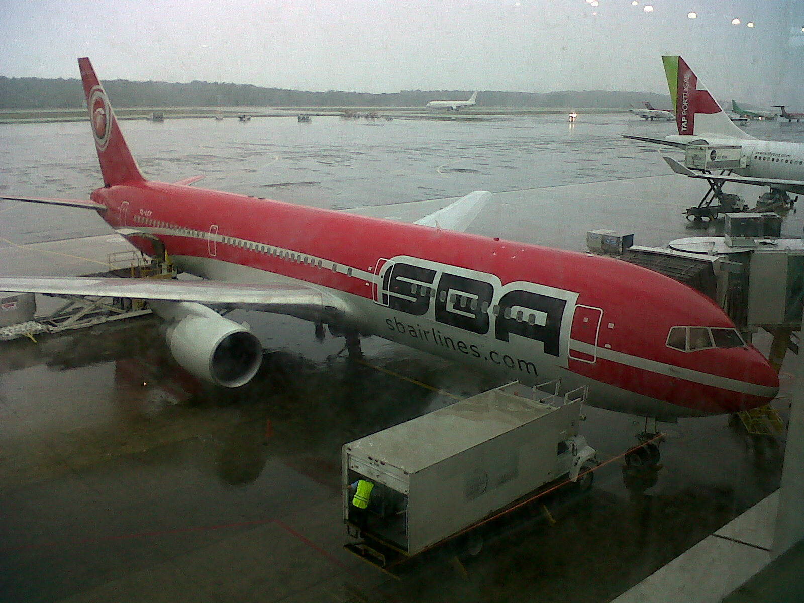 Boeing 767-300ER de SBA Airlines